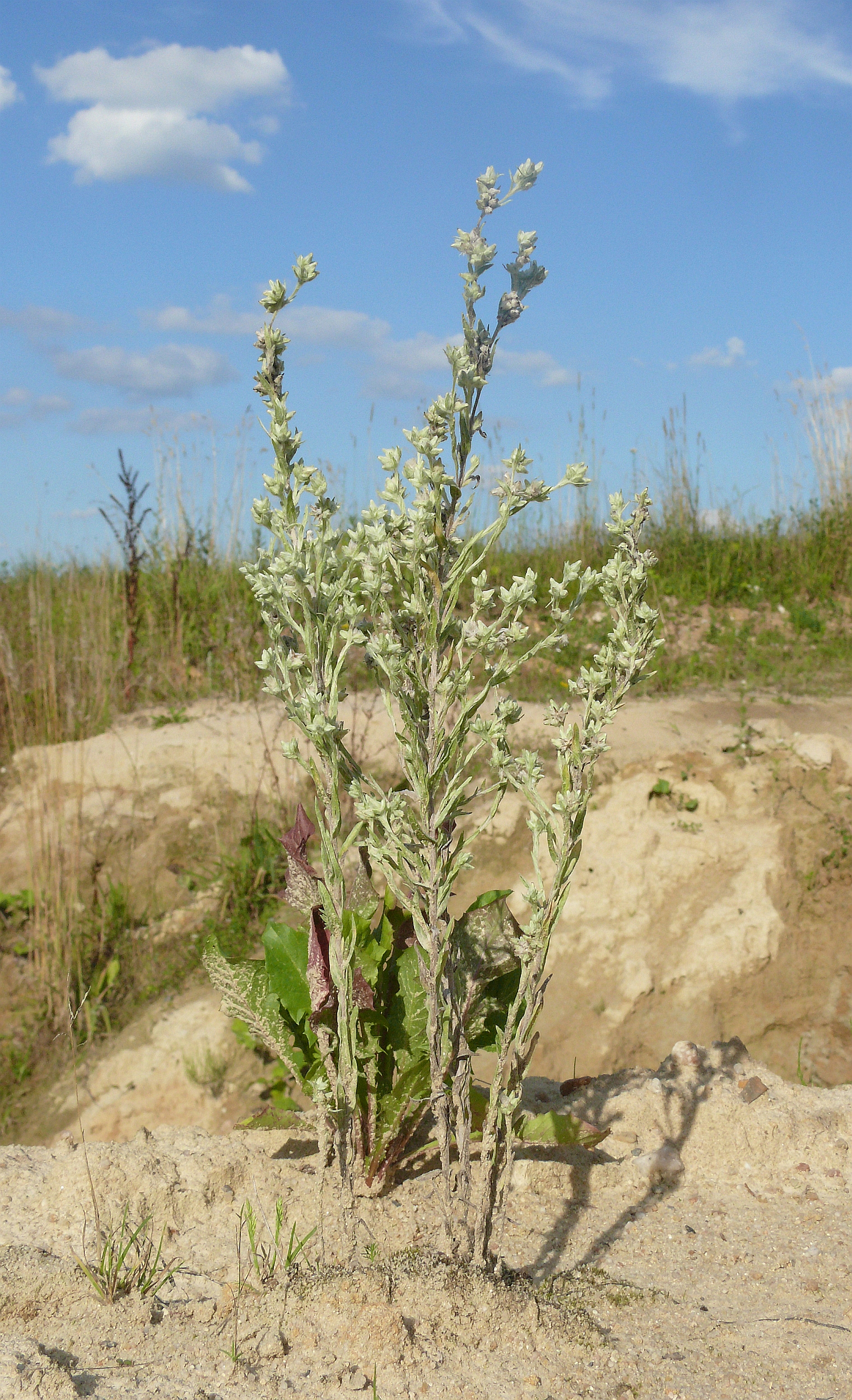 Filago arvensis, Schwäbisch-Fränkische Waldberge, Deutschland